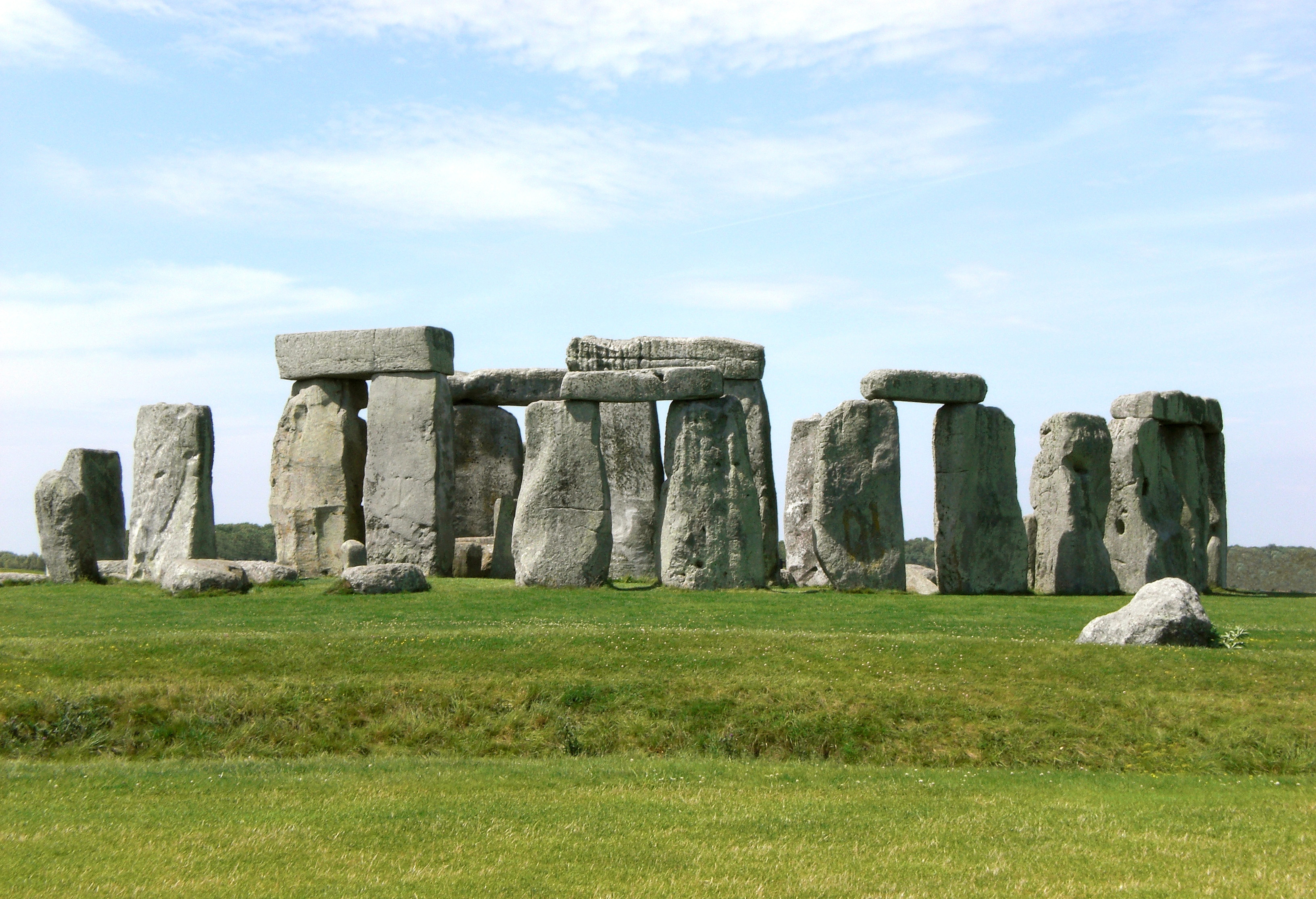 Retouched version of Bild:Stonehenge, Salisbury.JPG, which has the following description: ---- Beschreibung = Stonehenge im Juli 2008 Quelle = selbst fotografiert Urheber = Operarius Datum = 24.07.2008